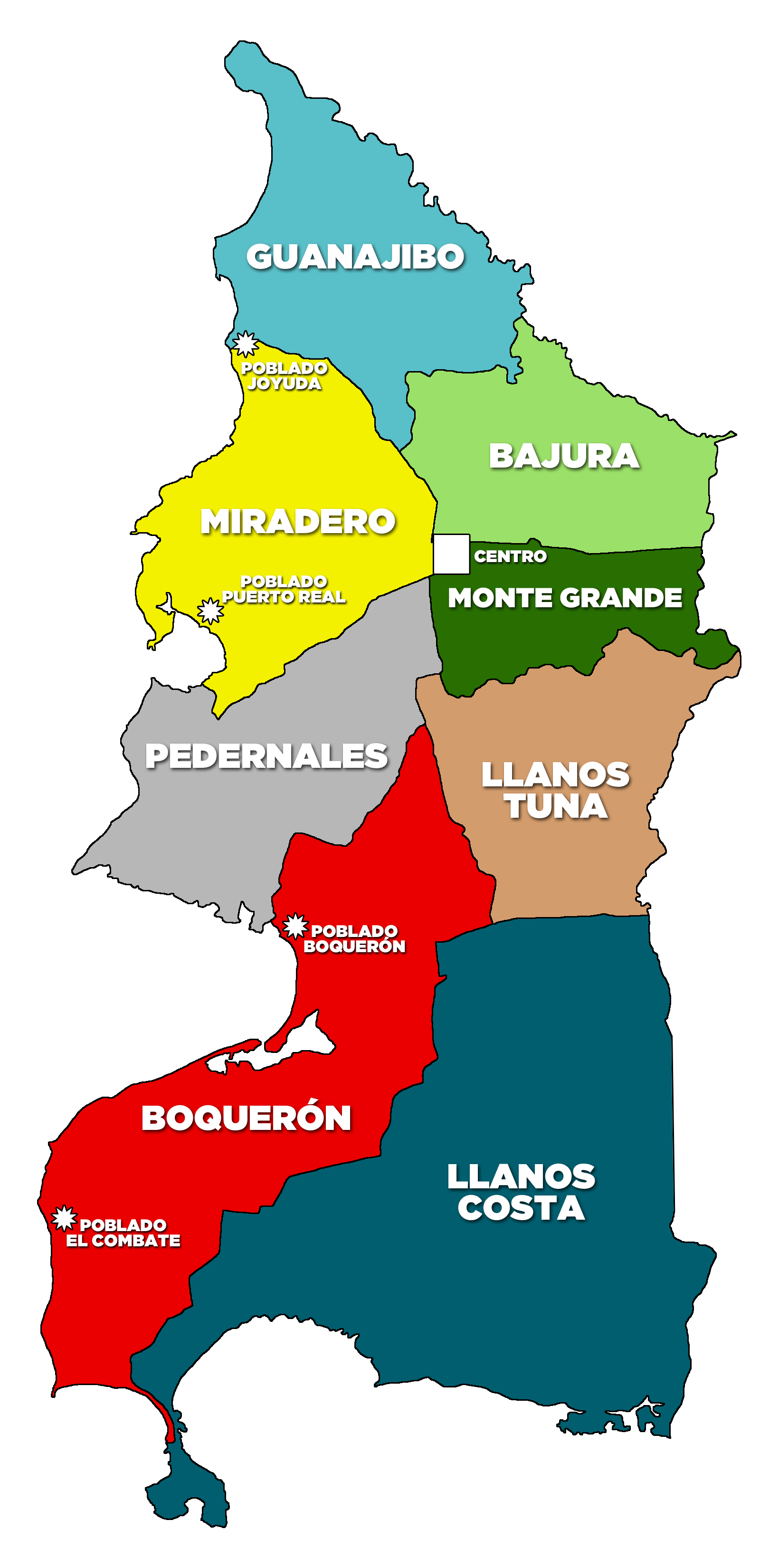 Mapa de Cabo Rojo